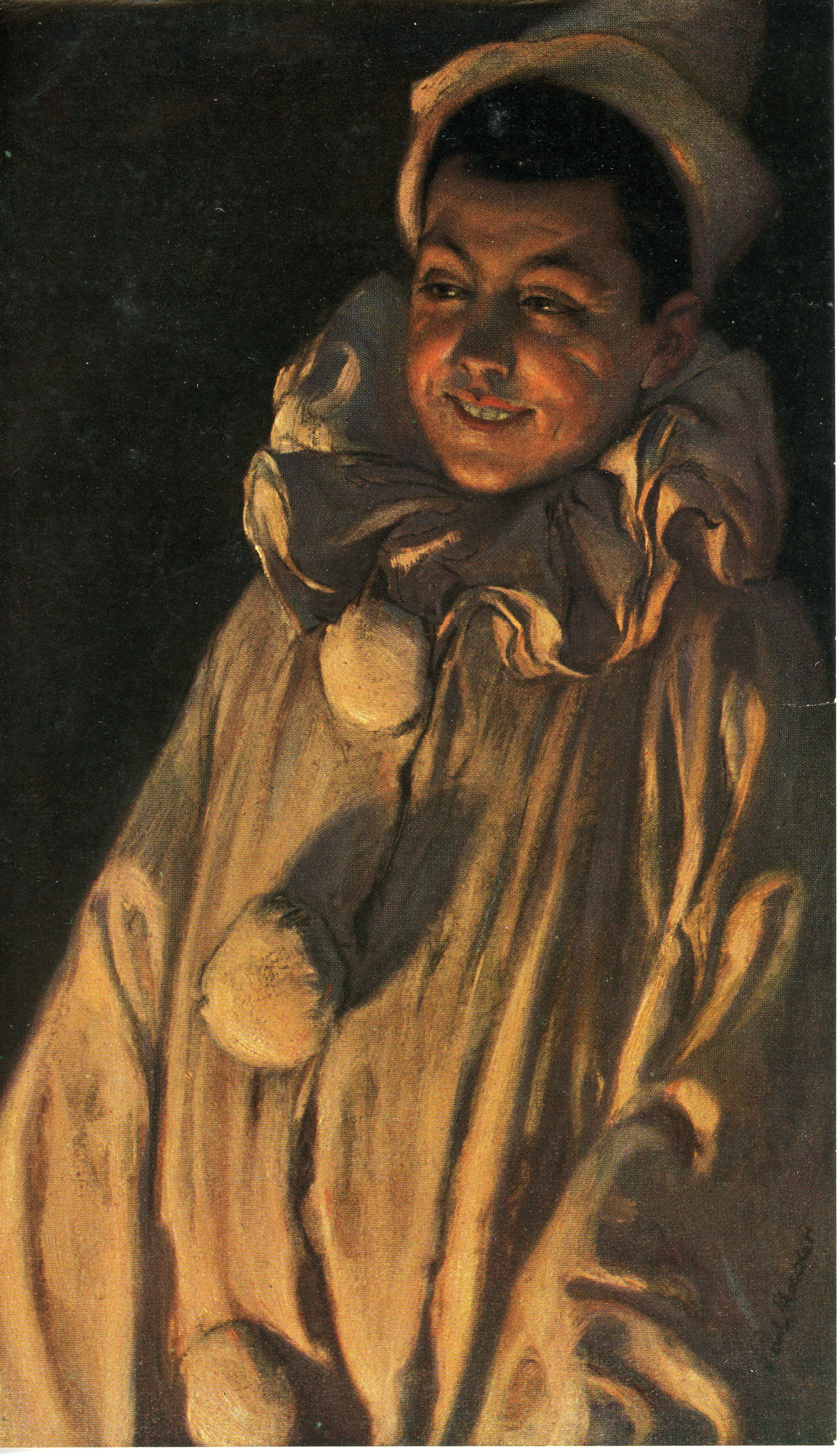 Paul Hoecker - Pierrot